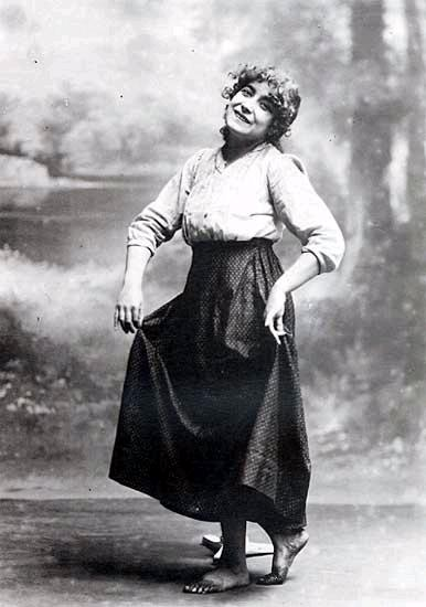 Margarita Xirgú, Catalan actress.